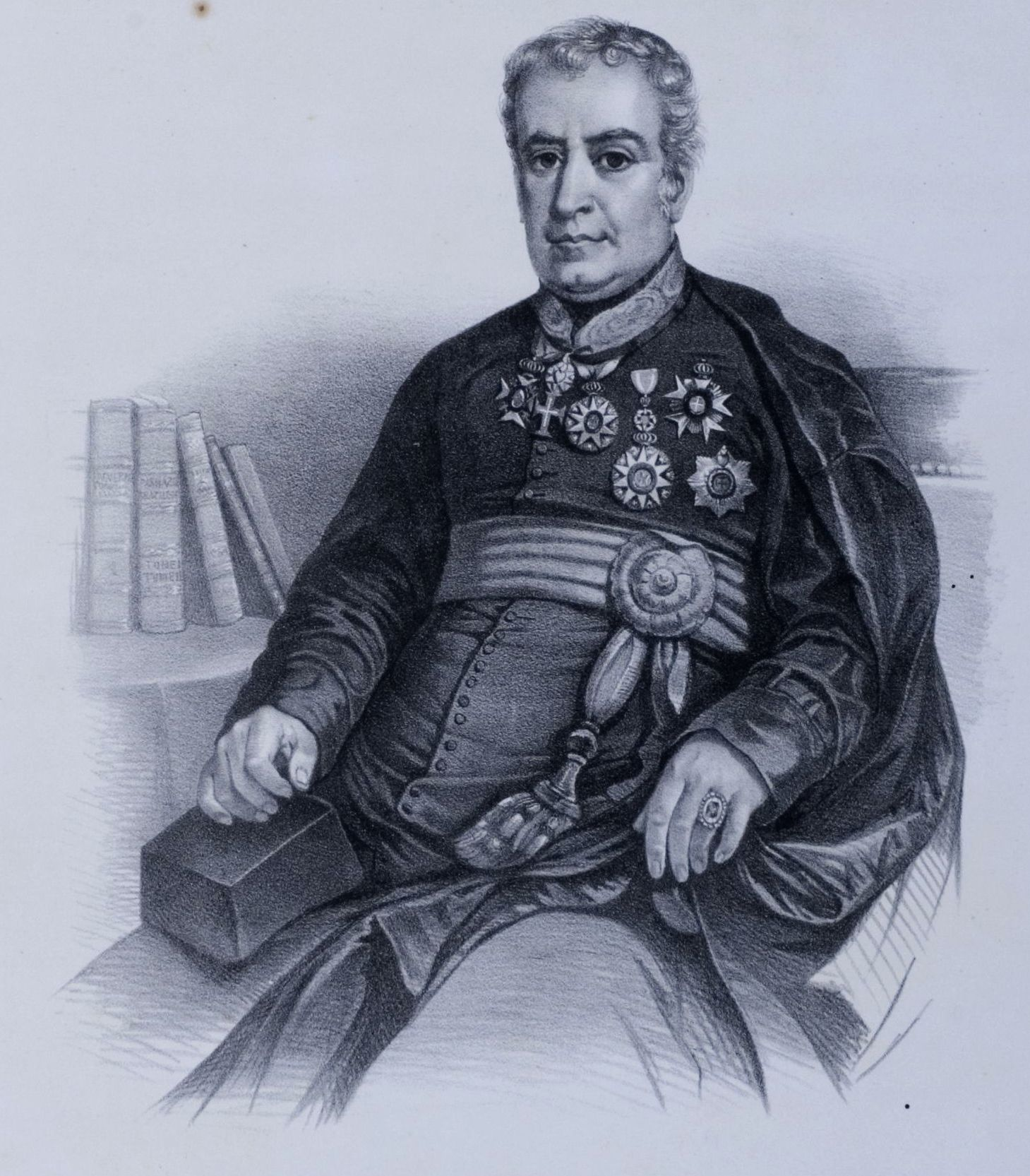 Litografia em preto e branco